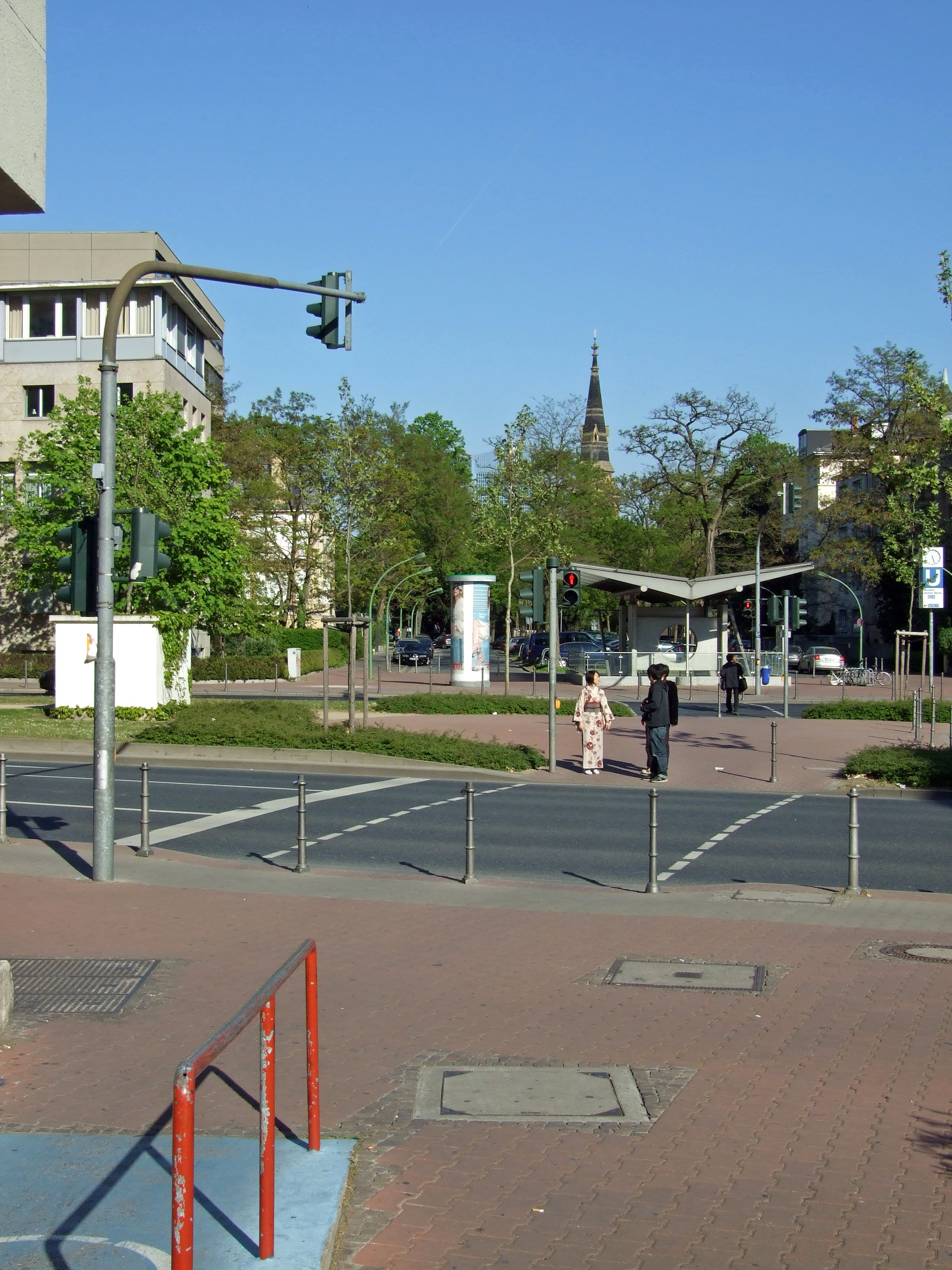 Verkehrsampel am „Frankfurter Institut für Sozialforschung“, die sog. „Adorno-Ampel“. Im Hintergrund ist eine Ecke des Instituts zu sehen.